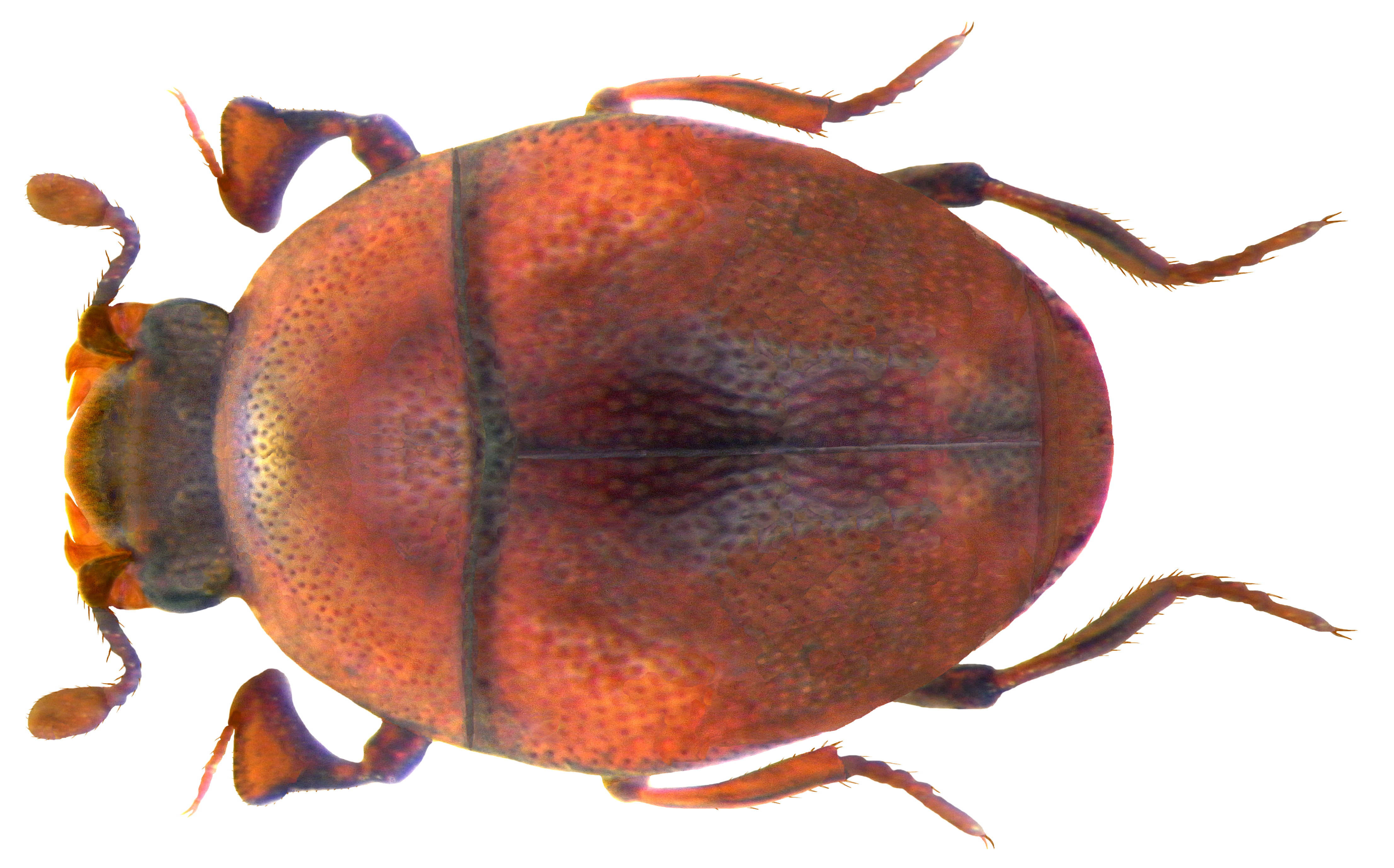 Familie: Histeridae Groesse: 1,2-1,5 mm Verbreitung: Europa Ökologie: im Mulm und unter Rinde alter Laubbäume Fundort: Germania, Thüringen, Hirschberg, Haag leg. A.Skale, 1995; det. L.Erbeling, 1997 Photo: U.Schmidt, 2009